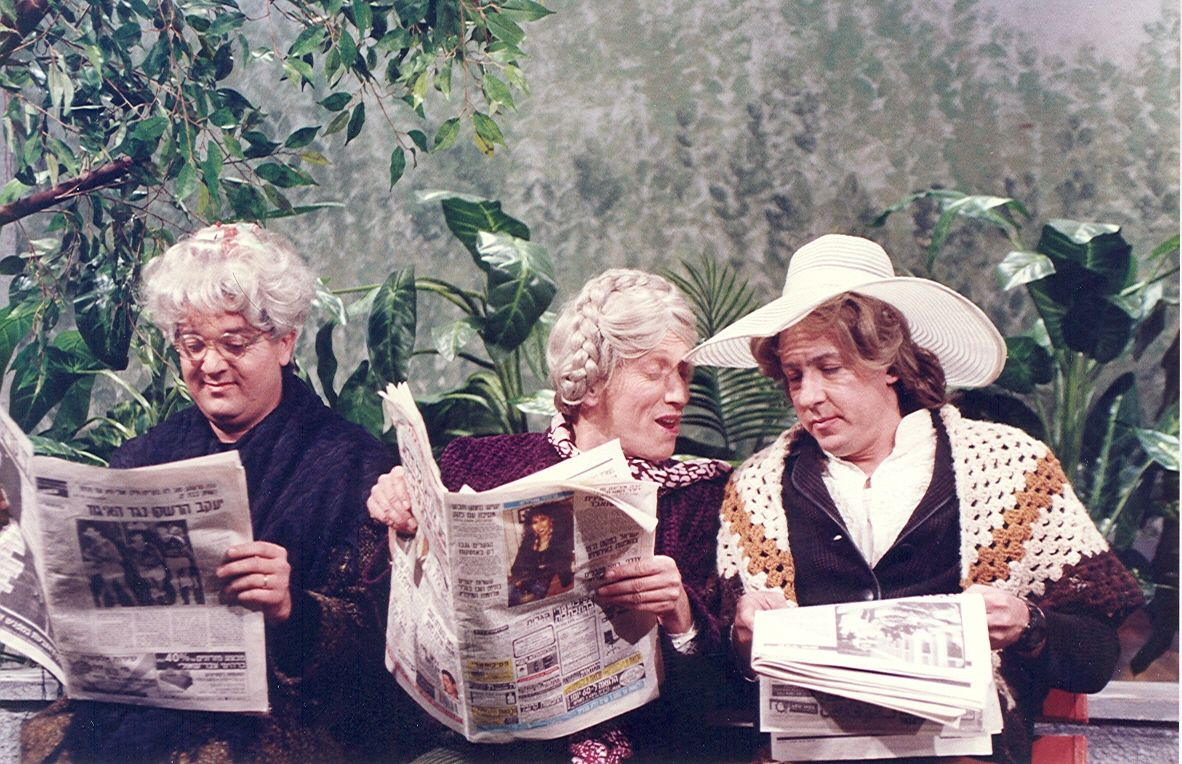 תכנית זהו זה במלחמת המפרץ שעסקה בהווי המלחמה שלושת הפולניות גידי גוב, מוני מושונוב ואבי קושניר